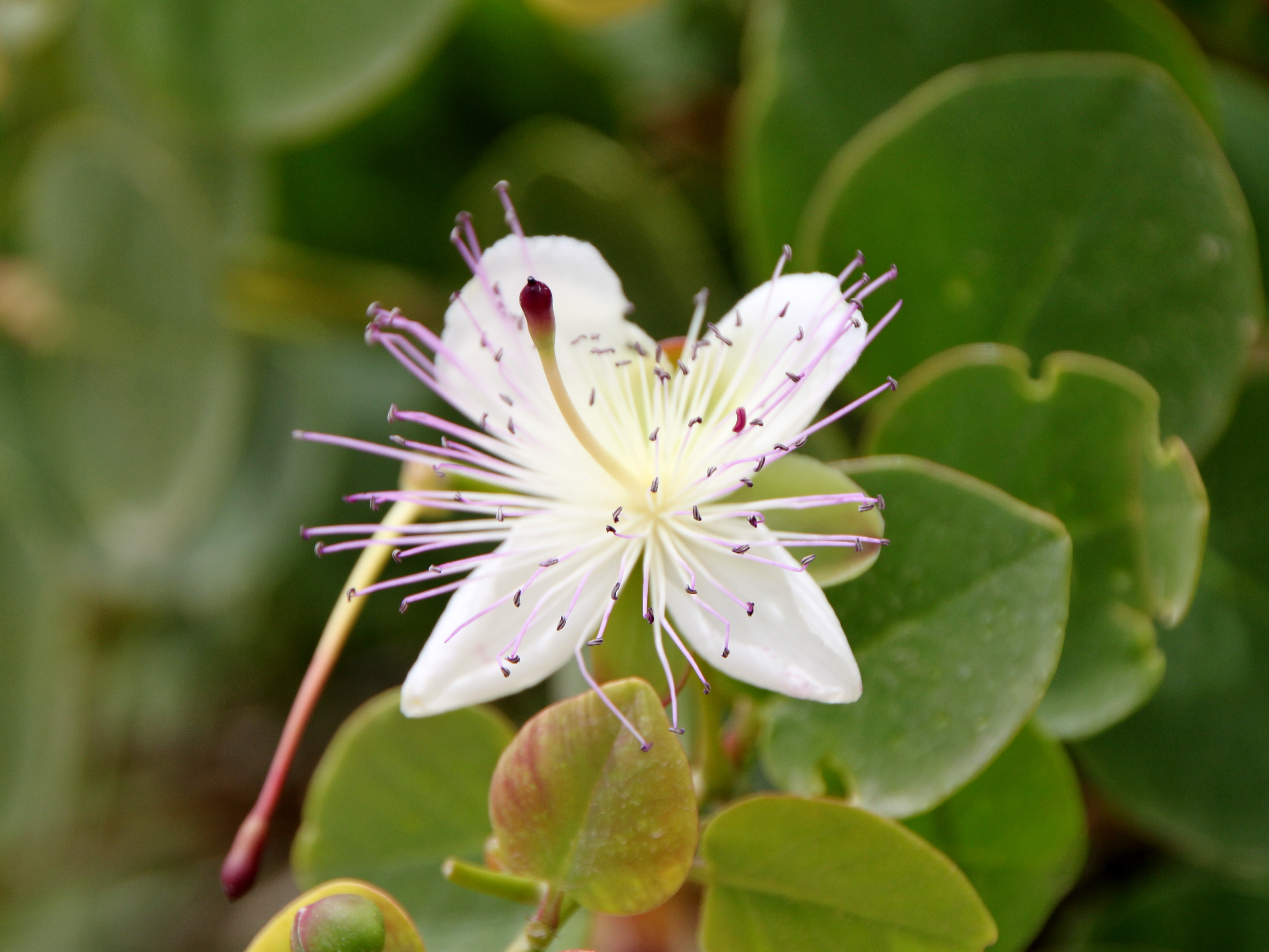 Blüte des Orientalischen Kapernstrauchs (Capparis orientalis) an der Südküste von Imeri Gramvousa (Ήμερη Γραμβούσα), Insel in der Gemeinde Kissamos, Präfektur Chania, Kreta, Griechenland